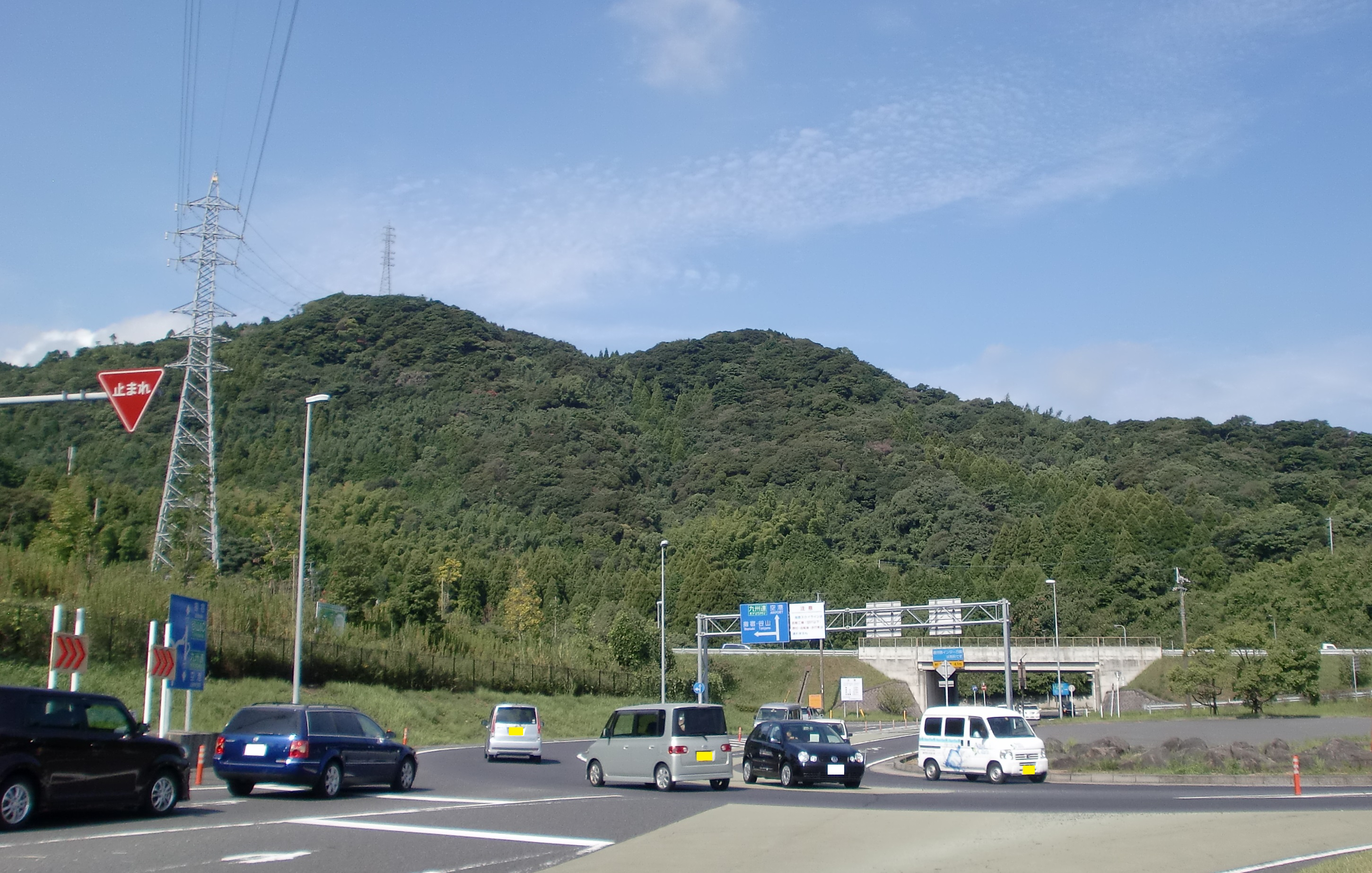 中山インターチェンジを入り口付近から望む。（自動車のナンバーについては加工処理済み）